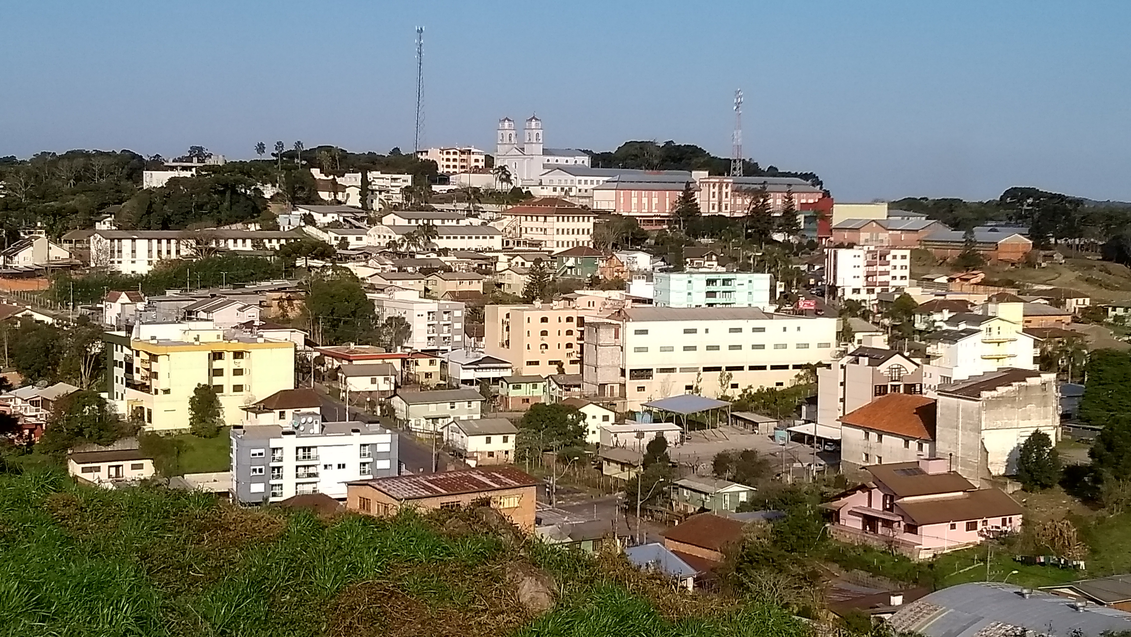 Ana Rech - Agosto 2019